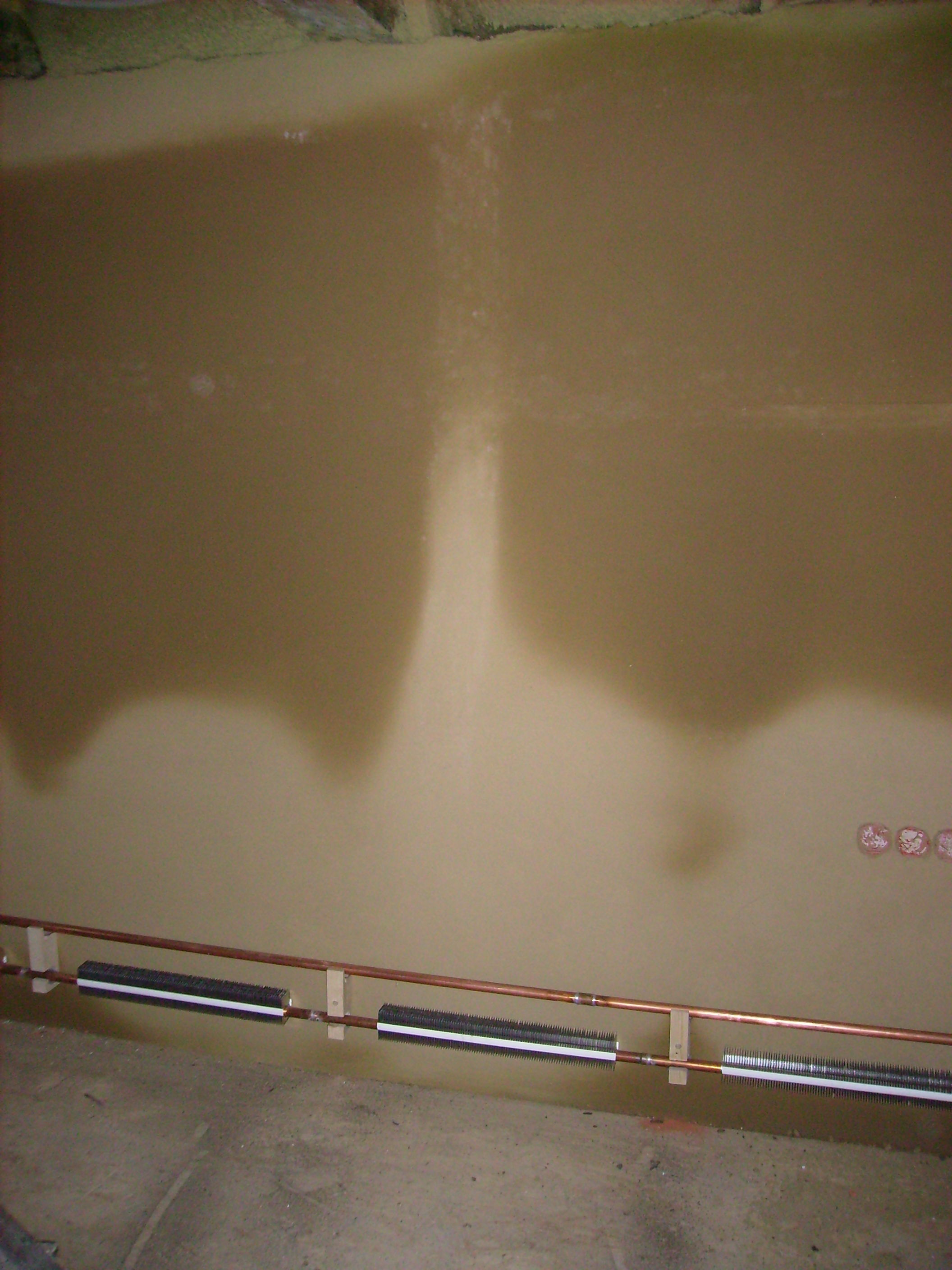 die Heizleisten trocknen den noch feuchten Lehmputz allmählich von unten her aus. Die Heizung war seit drei Tagen im Betrieb.